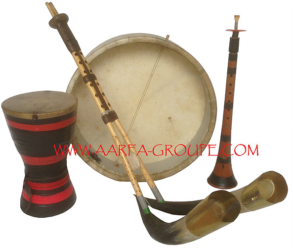 Instrument aarfa groupe